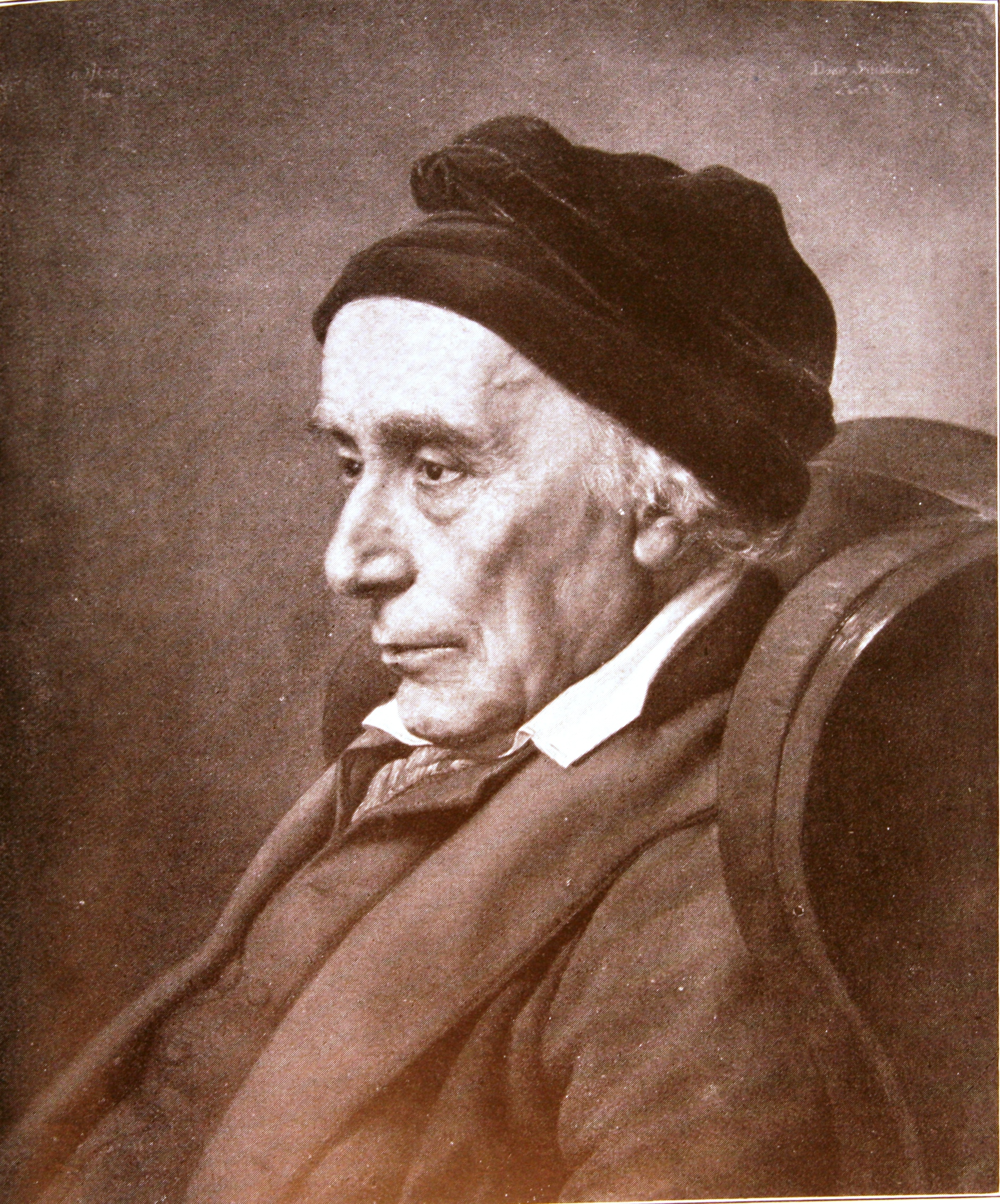 Portrait David Friedländer